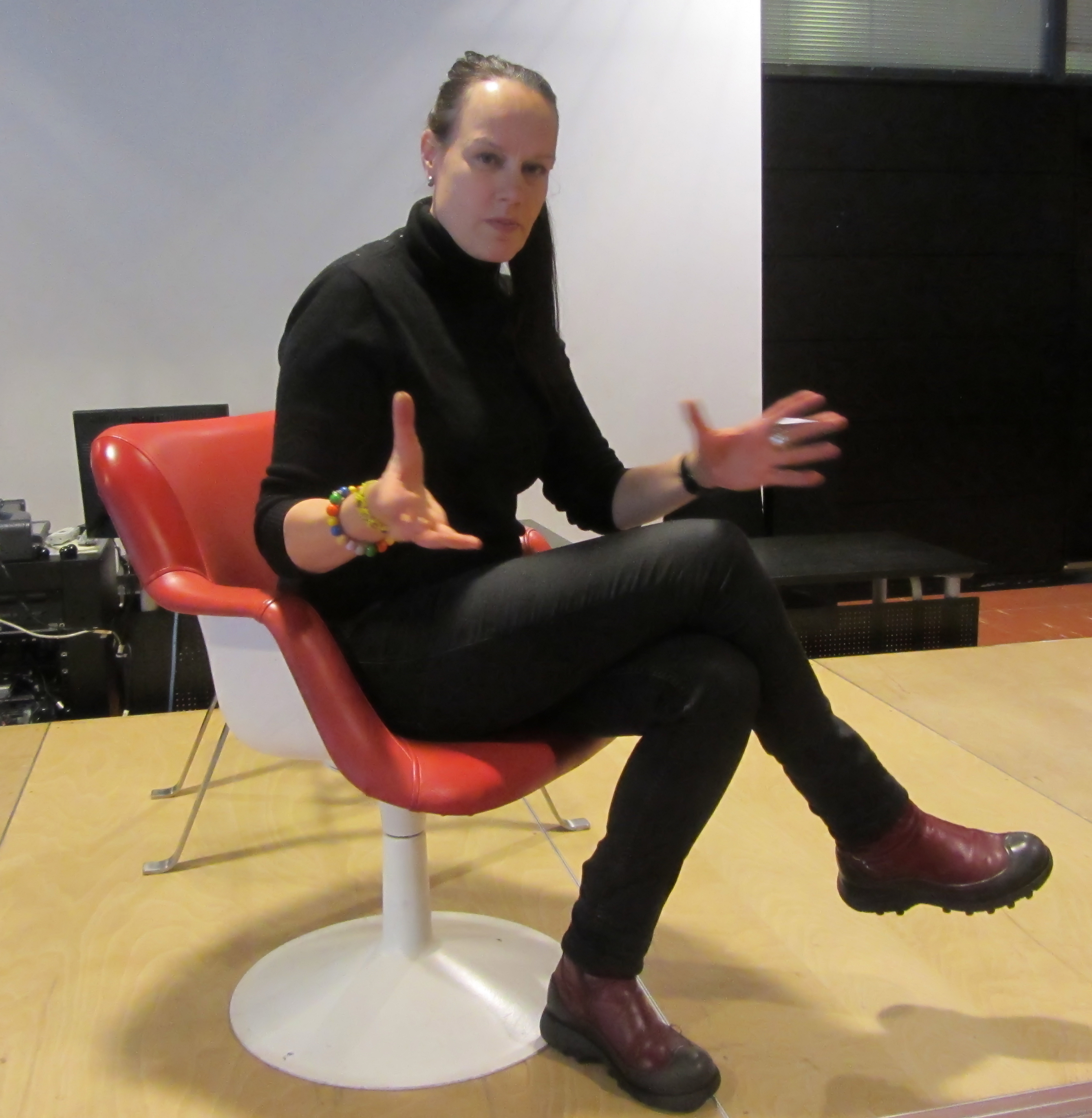 Kirjailija Riikka Ala-Harja vieraili Juuret-kirjallisuustapahtumassa Keravalla 2014.